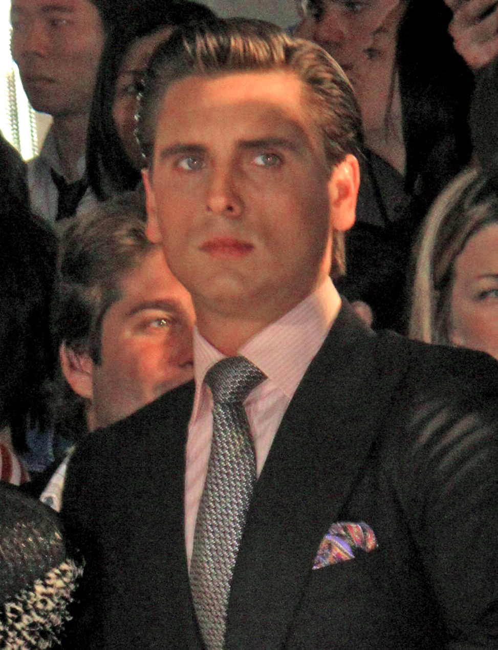 Scott Disick en 2010.